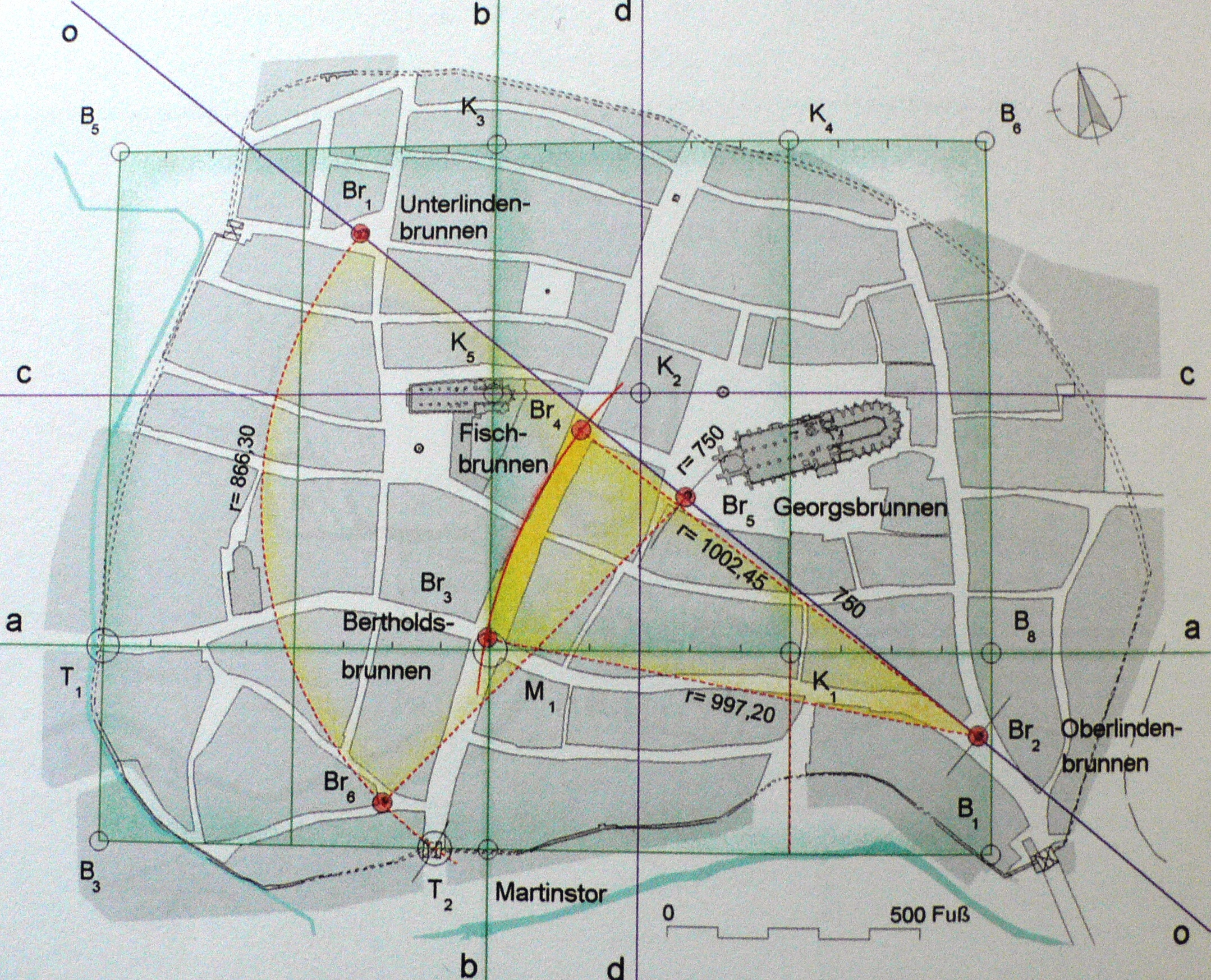 Laufbrunnen einschließlich des Georgsbrunnens im Stadtgrundriss (nach Humpert/Schenk, Entdeckung der mittelalterlichen Stadtplanung, Stuttgart 2001)